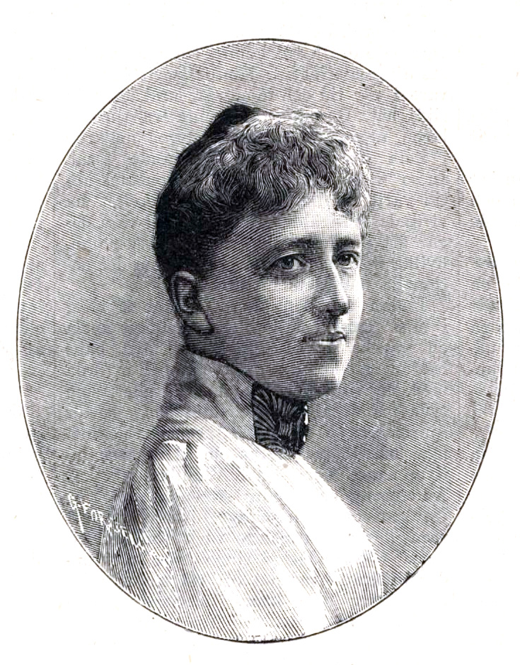 Ida von Schulzenheim (1859-1940)